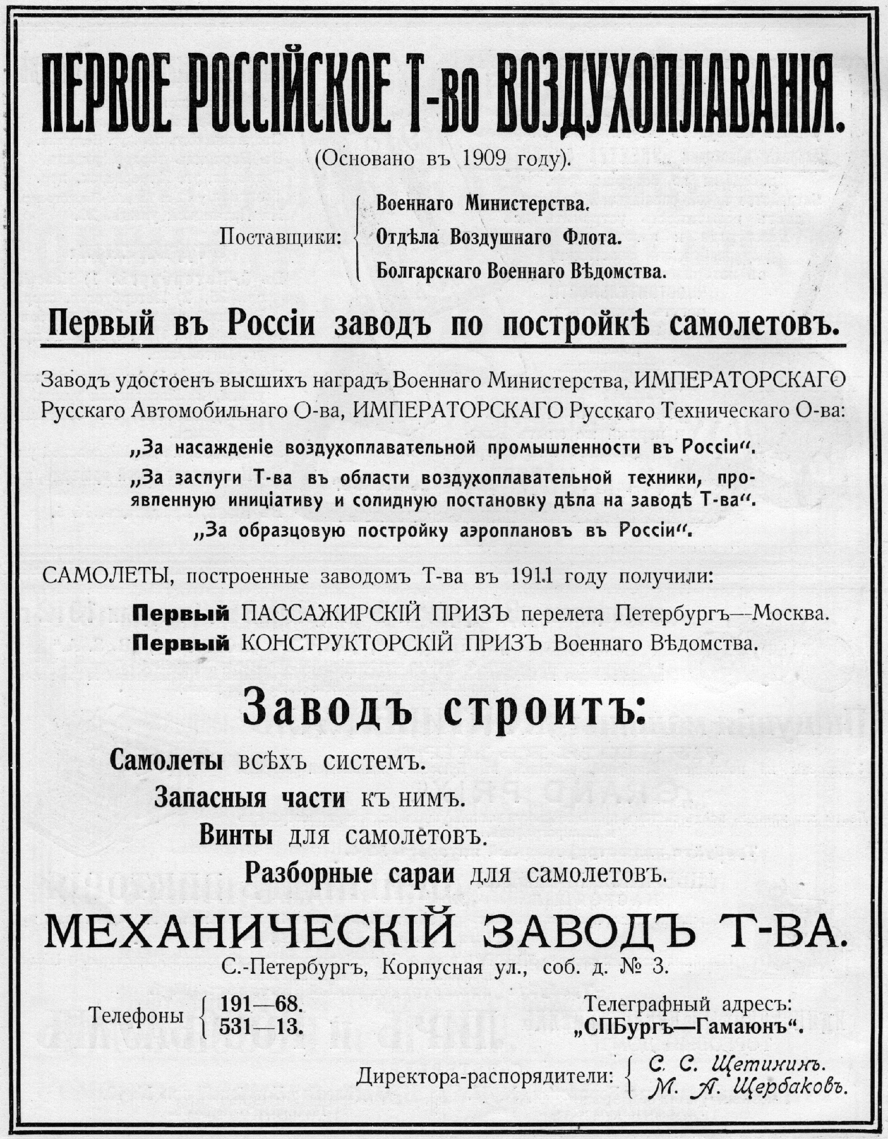 Рекламный листок завода Первого Российского Товарищества Воздухоплавания – ПРТВ «С. С. Щетинин и Ко» (Завод летательных аппаратов «Гамаюн») в Петербурге